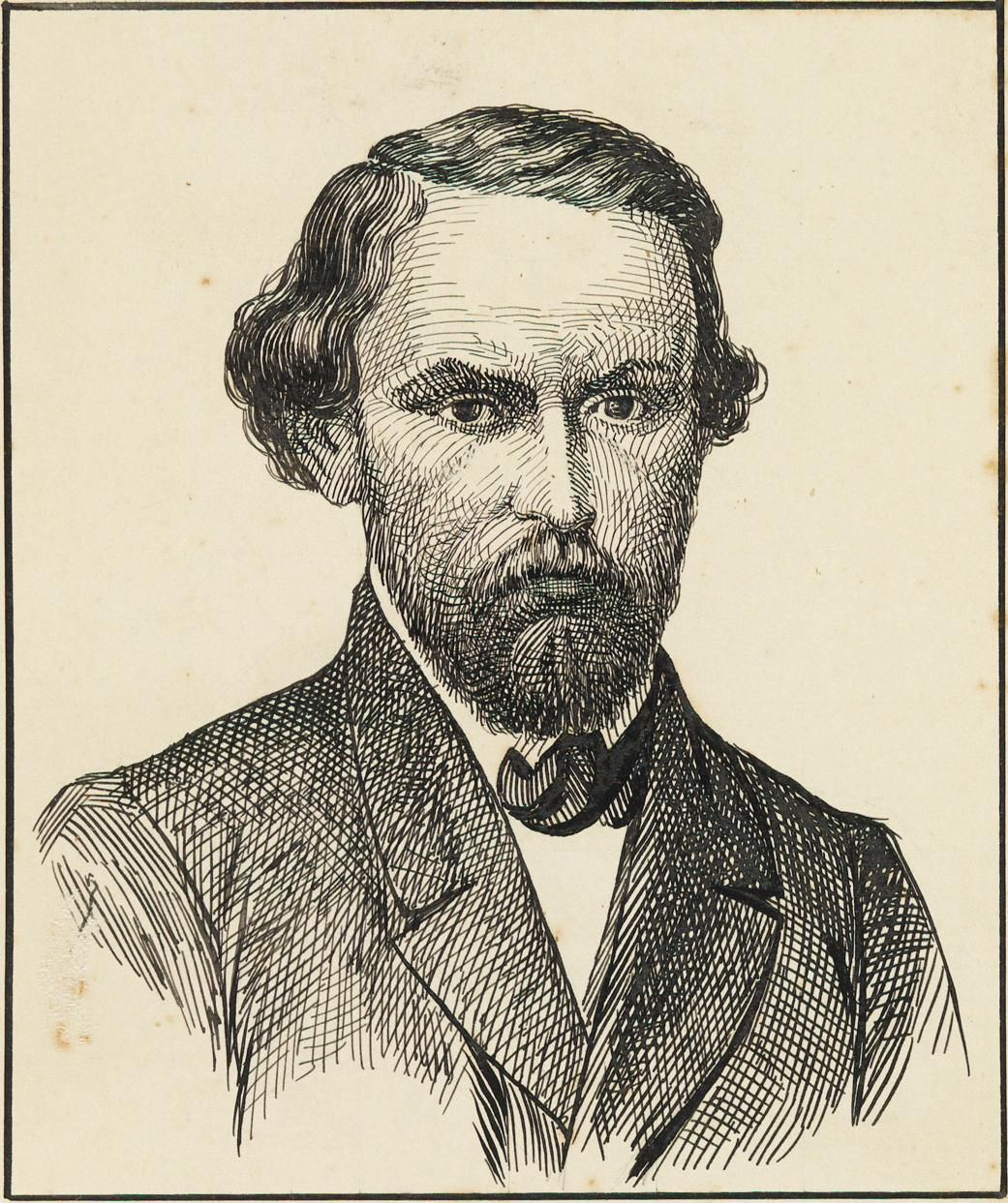 Gonçalves Dias